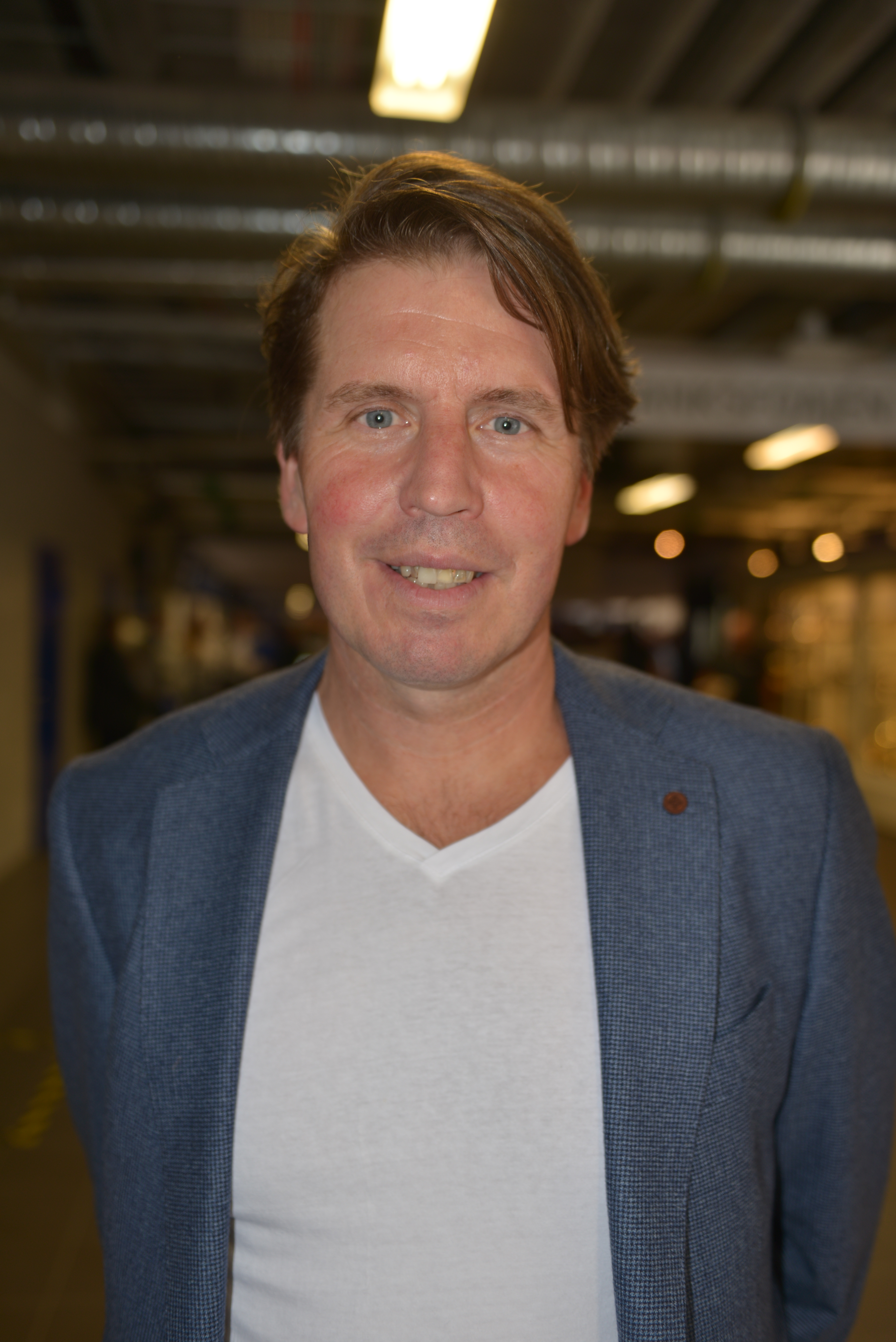 Jan Houkko, 2019.